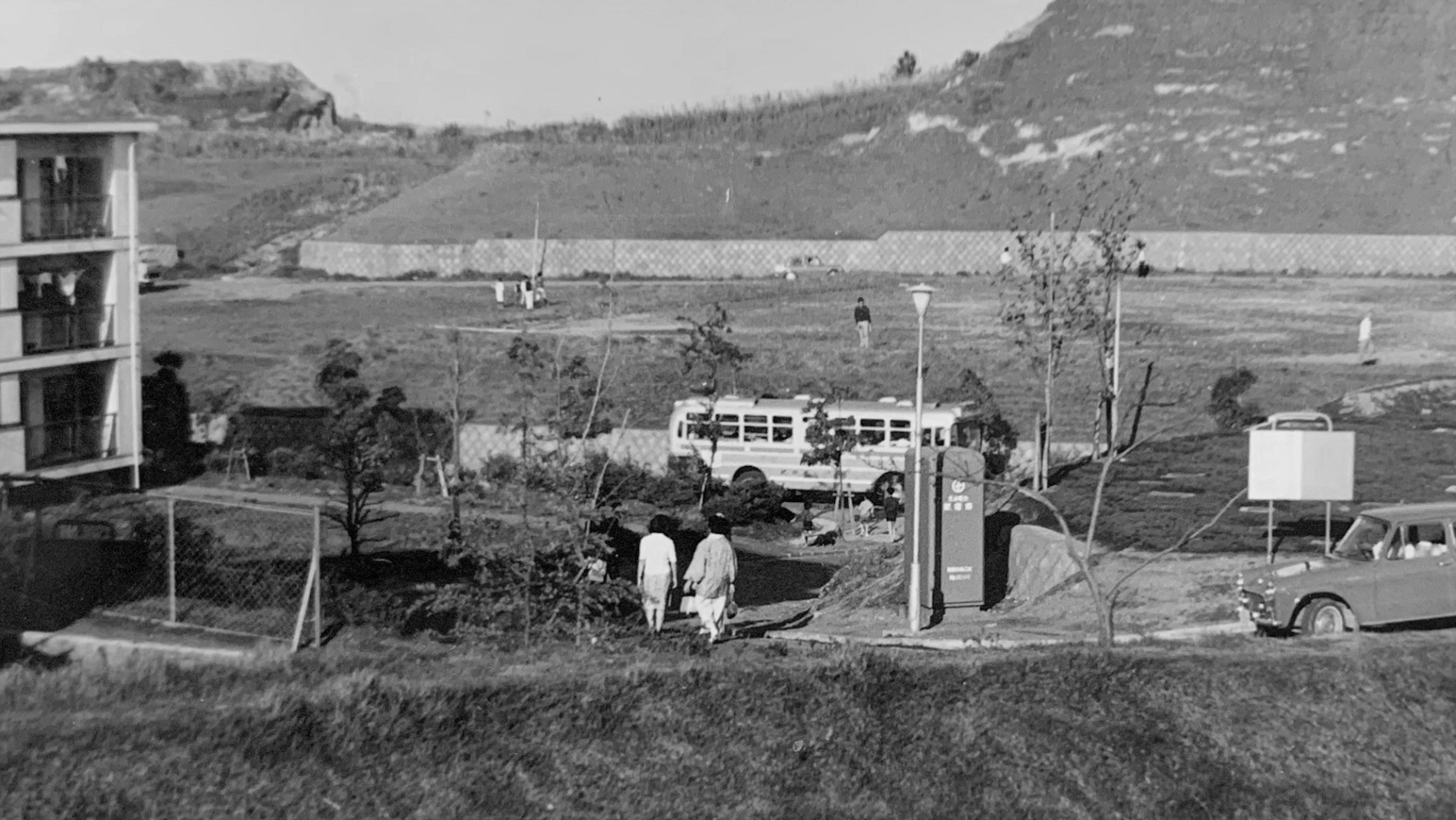 横浜市磯子区汐見台（1966年）